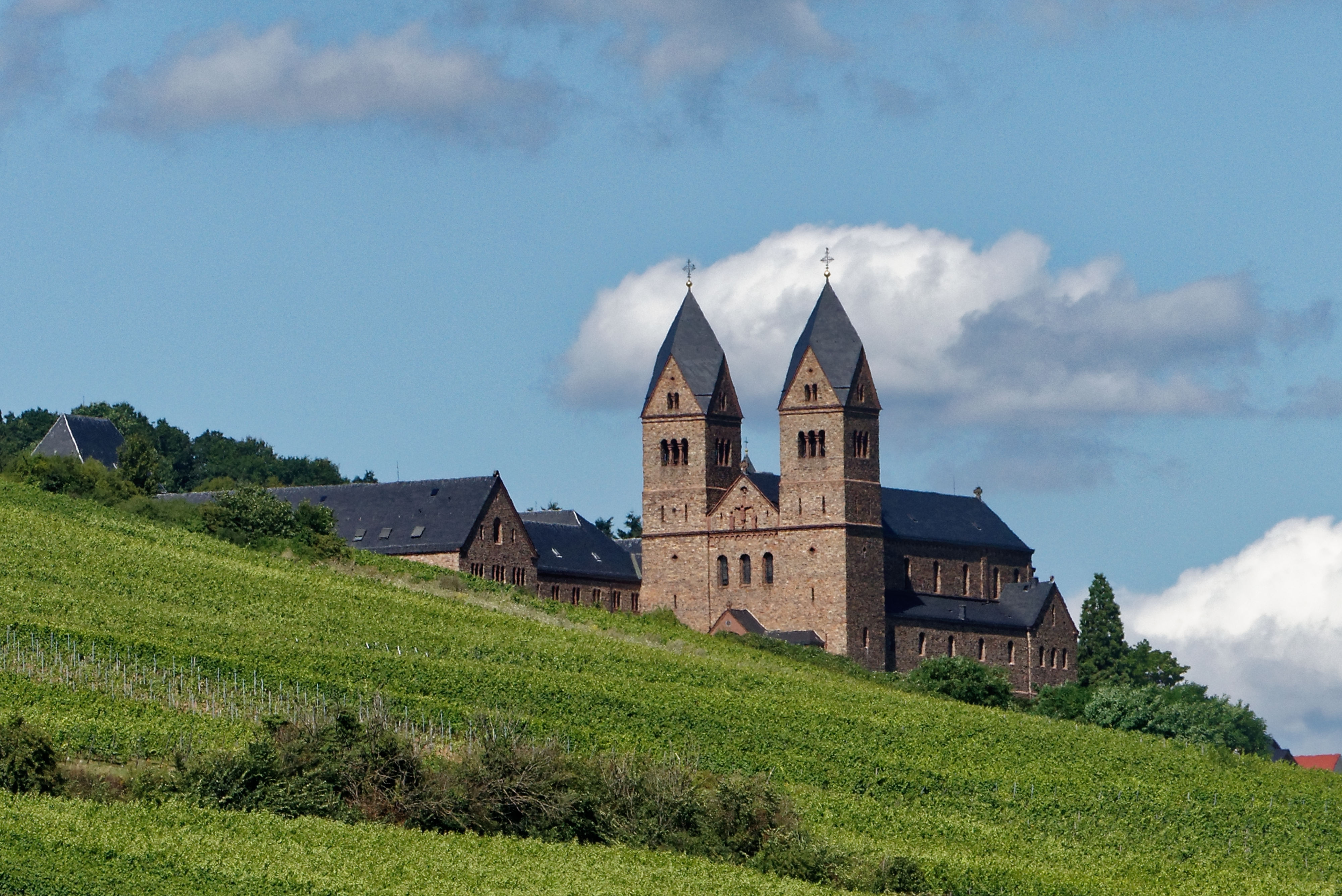 Rüdesheim Abtei St. Hildegard Blick aus der Seilbahn